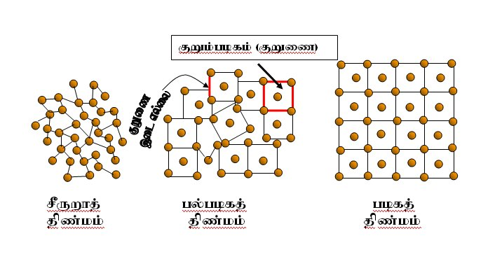 I, C.R.Selvakumar, created this diagram and I release it under GNU Free Documentation License. பகுப்பு:தமிழில் விளக்க வரைபடங்கள்